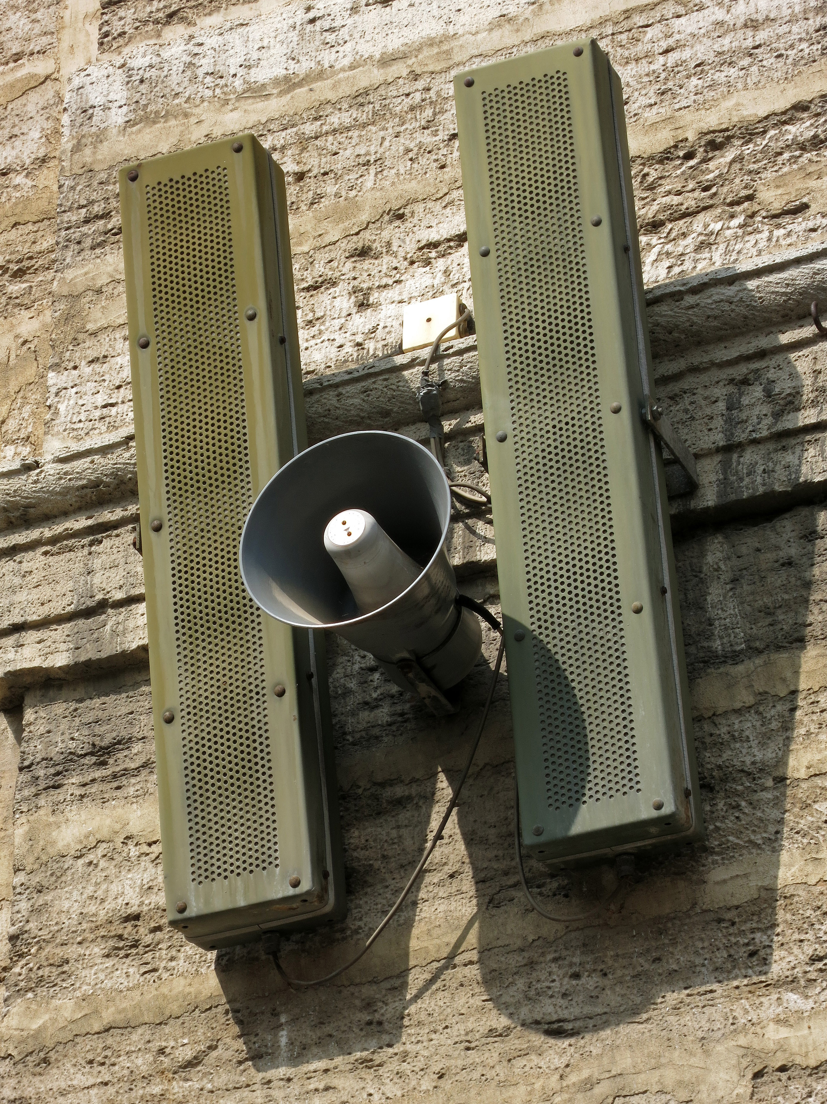 Lautsprecheranlage am Rathaus in Bad Langensalza. Typisches armeeoliv für ursprünglich militärische Beschallungsanlagen.